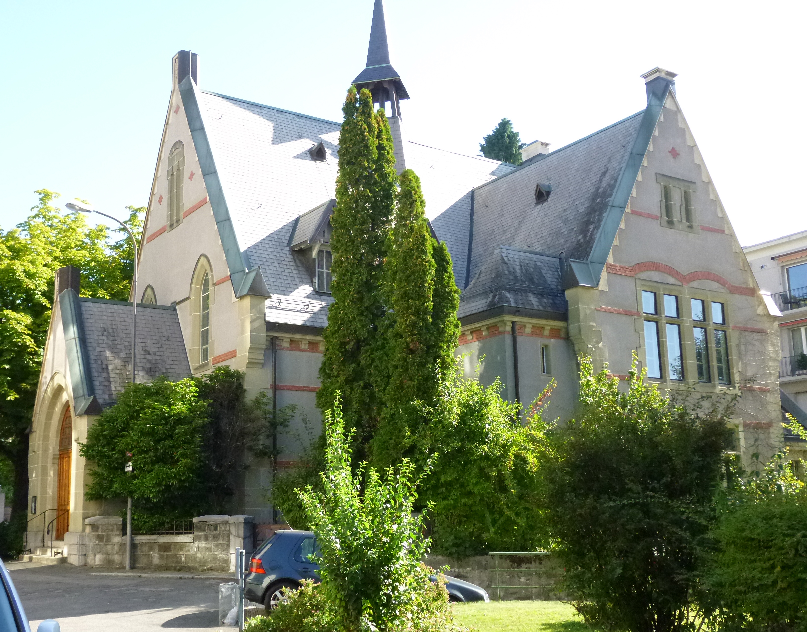 Eglise écossaise de Lausanne